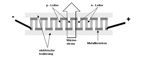 ... andere Versionen: peltier.jpg